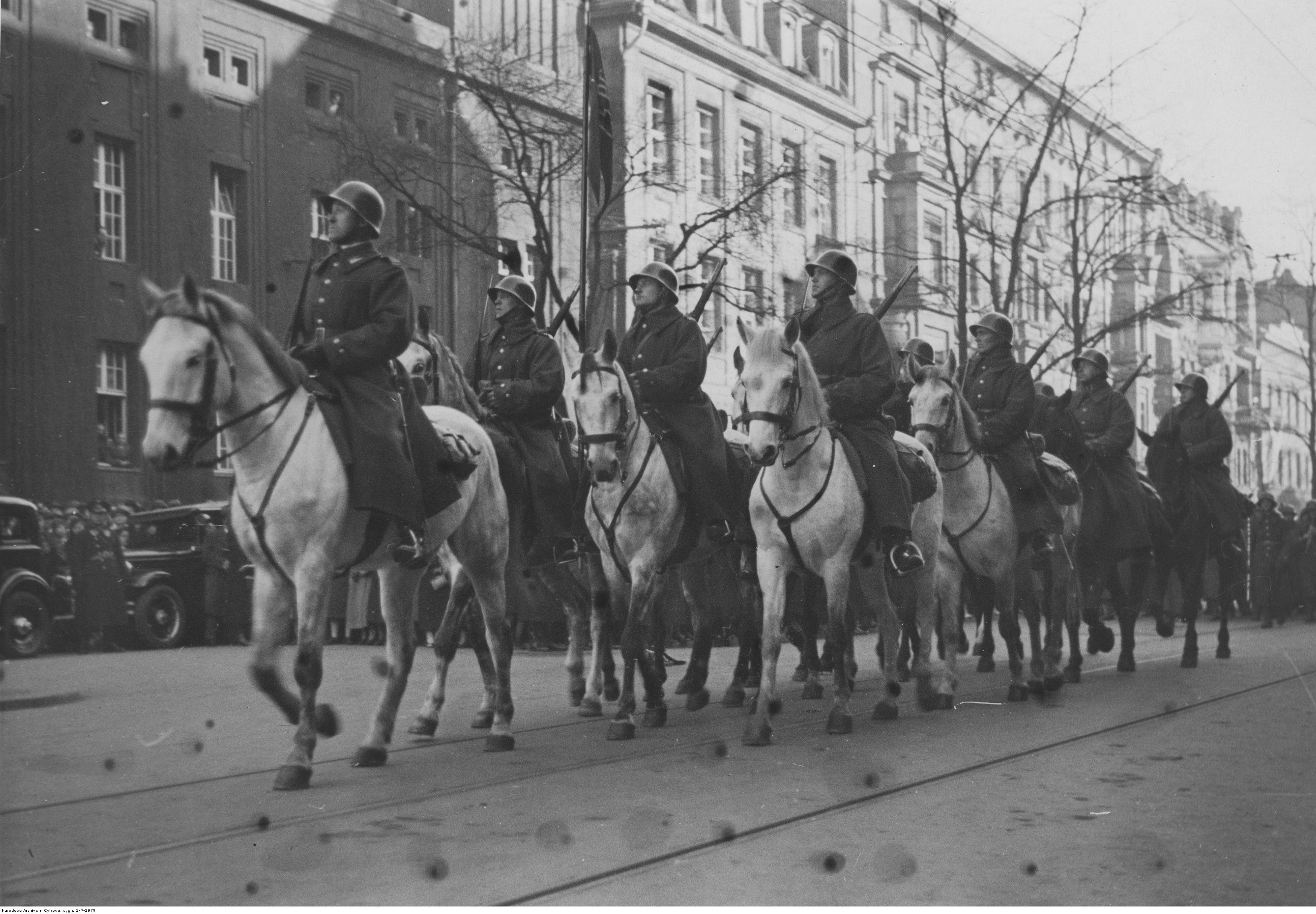 Defilada podczas obchodów Święta Niepodległości w Katowicach. 73 Pułk Piechoty podczas defilady. Koncern Ilustrowany Kurier Codzienny - Archiwum Ilustracji. Sygnatura: 1-P-2979